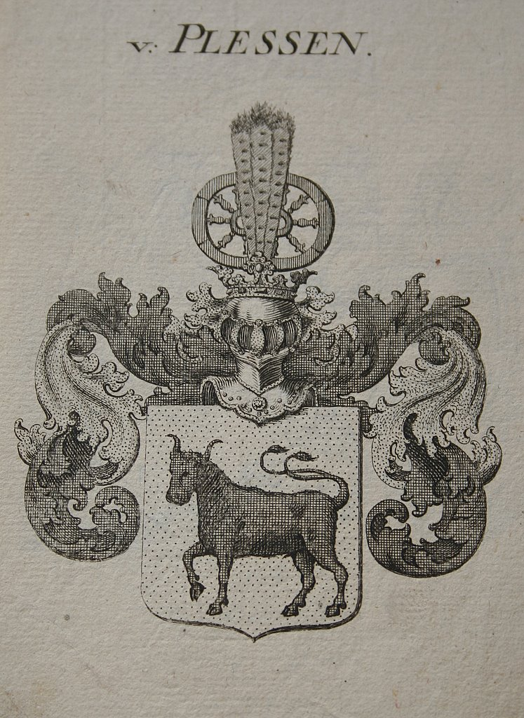 Wappen des Familienzweiges von Plessen Datum: 18. Jahrhundert Urheber: unbekannter Heraldiker Quelle